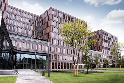 Neuer Campus der Frankfurt School of Finance & Management